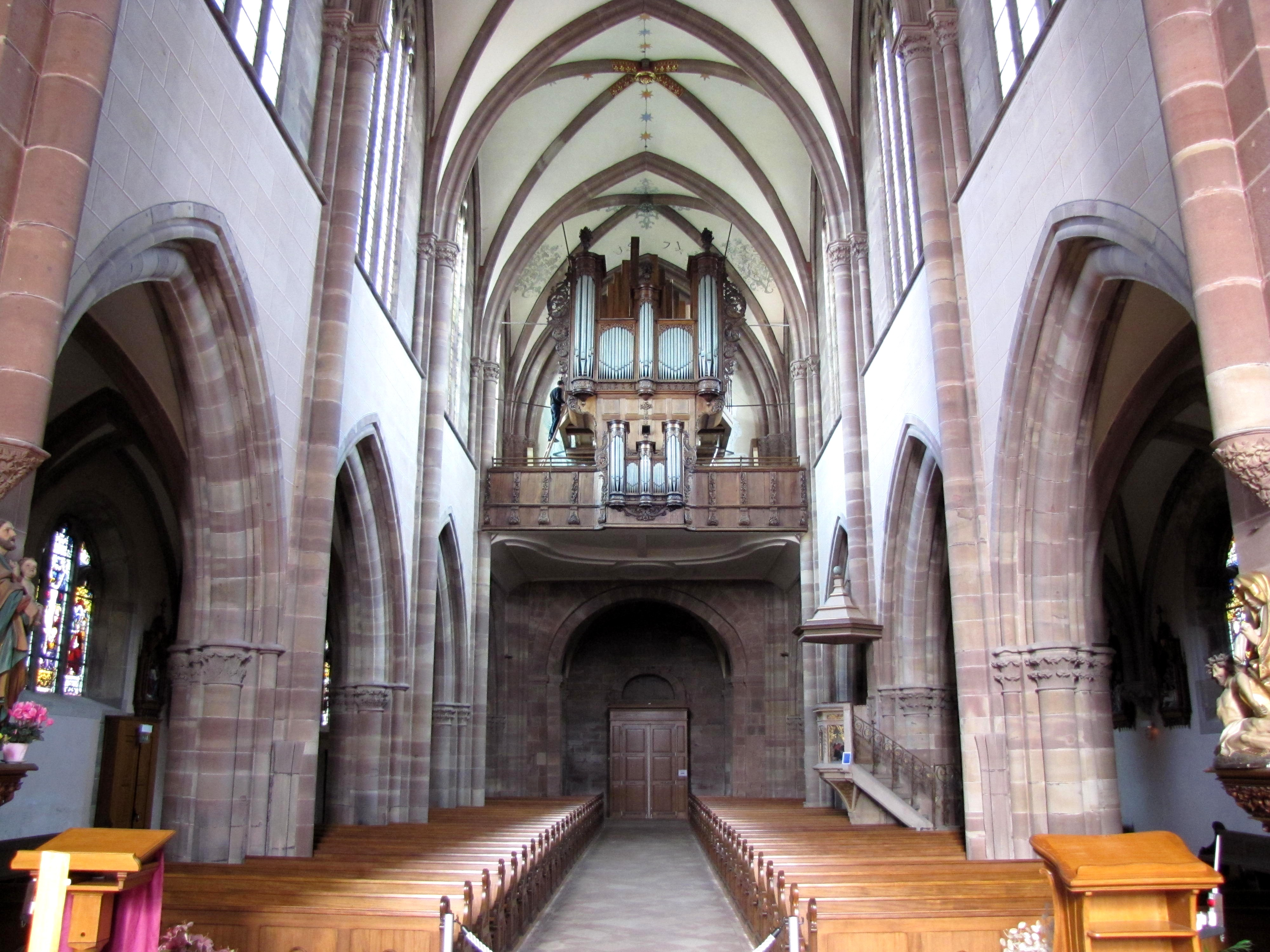 Alsace, Bas-Rhin, Abbatiale Saint-Étienne de Marmoutier (PA00084783, IA67007715). Vue intérieure de la nef vers la tribune d'orgue.